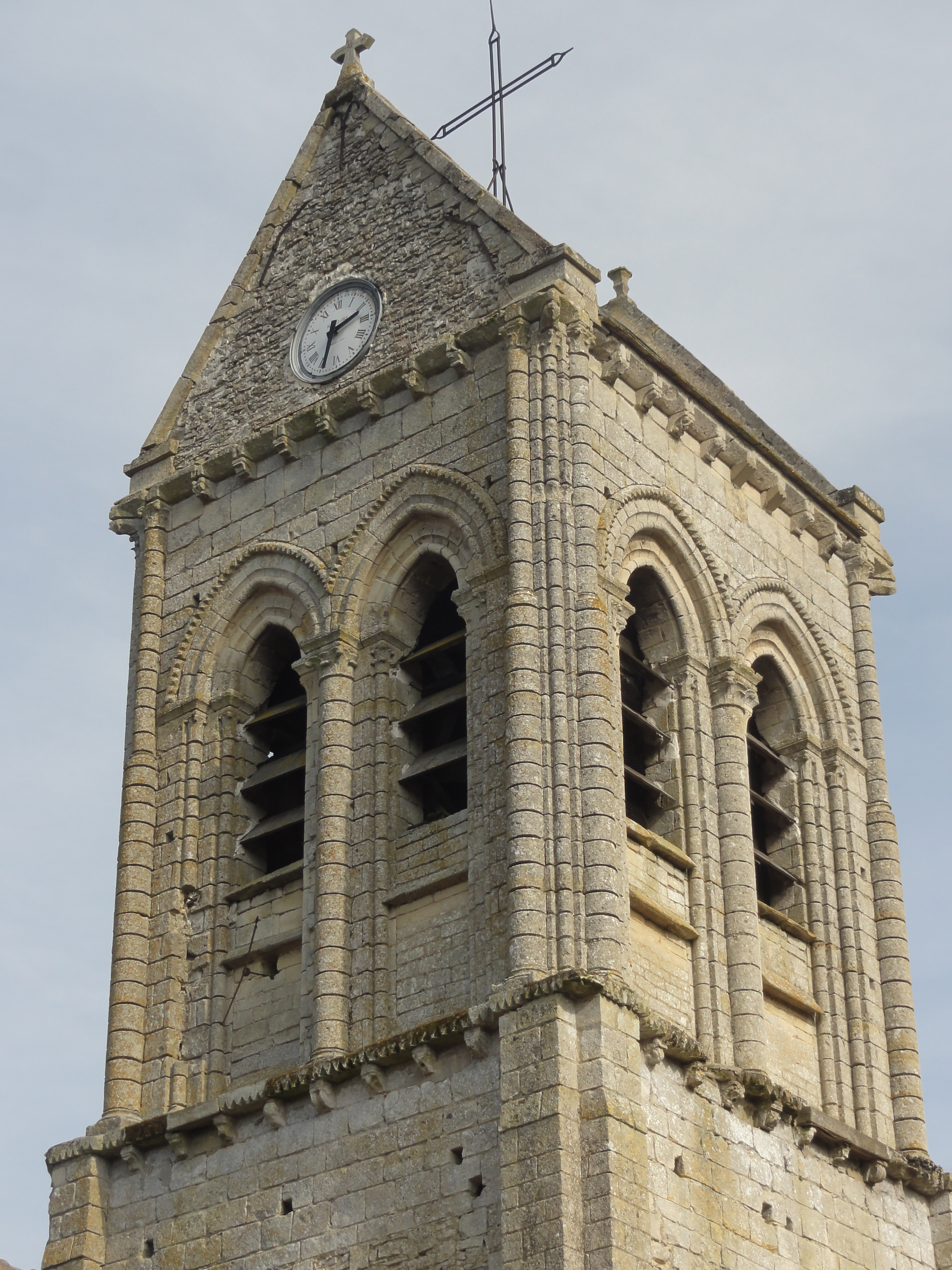 Église Saint-Léger de Delincourt - voir titre.